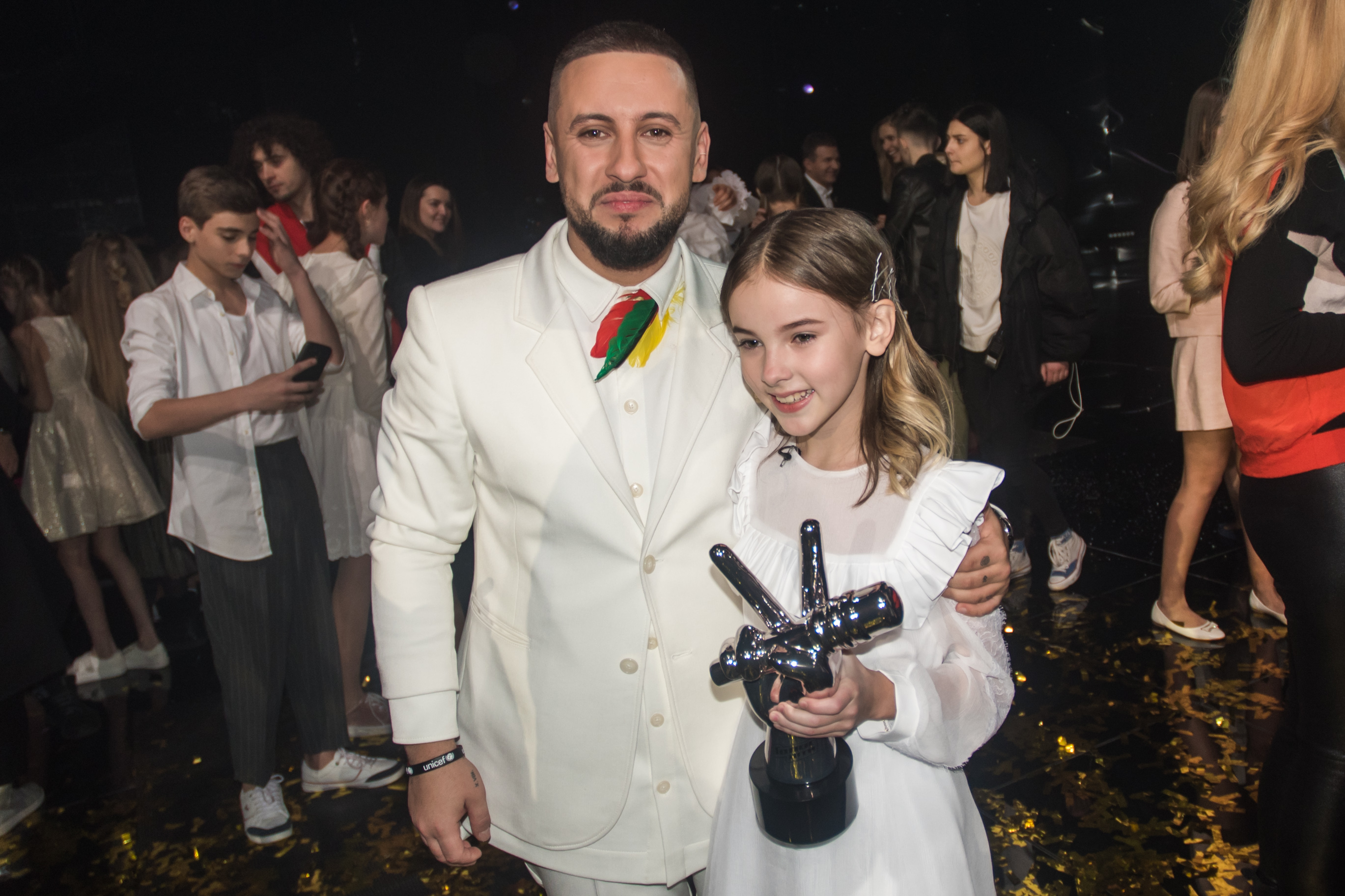 Финал Голос. Дiти 4. Monatik и Данэлия Тулешова